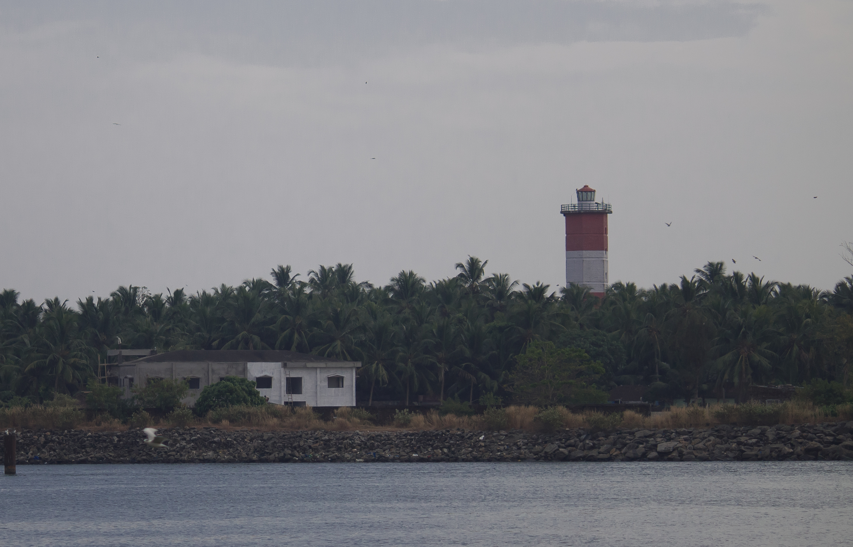 ചാലിയത്തുള്ള ബേപൂർ വിളക്കുമാടം. ബേപ്പൂർ പുളിമൂട്ടിൽ നിന്നുള്ള ദൃശ്യം.